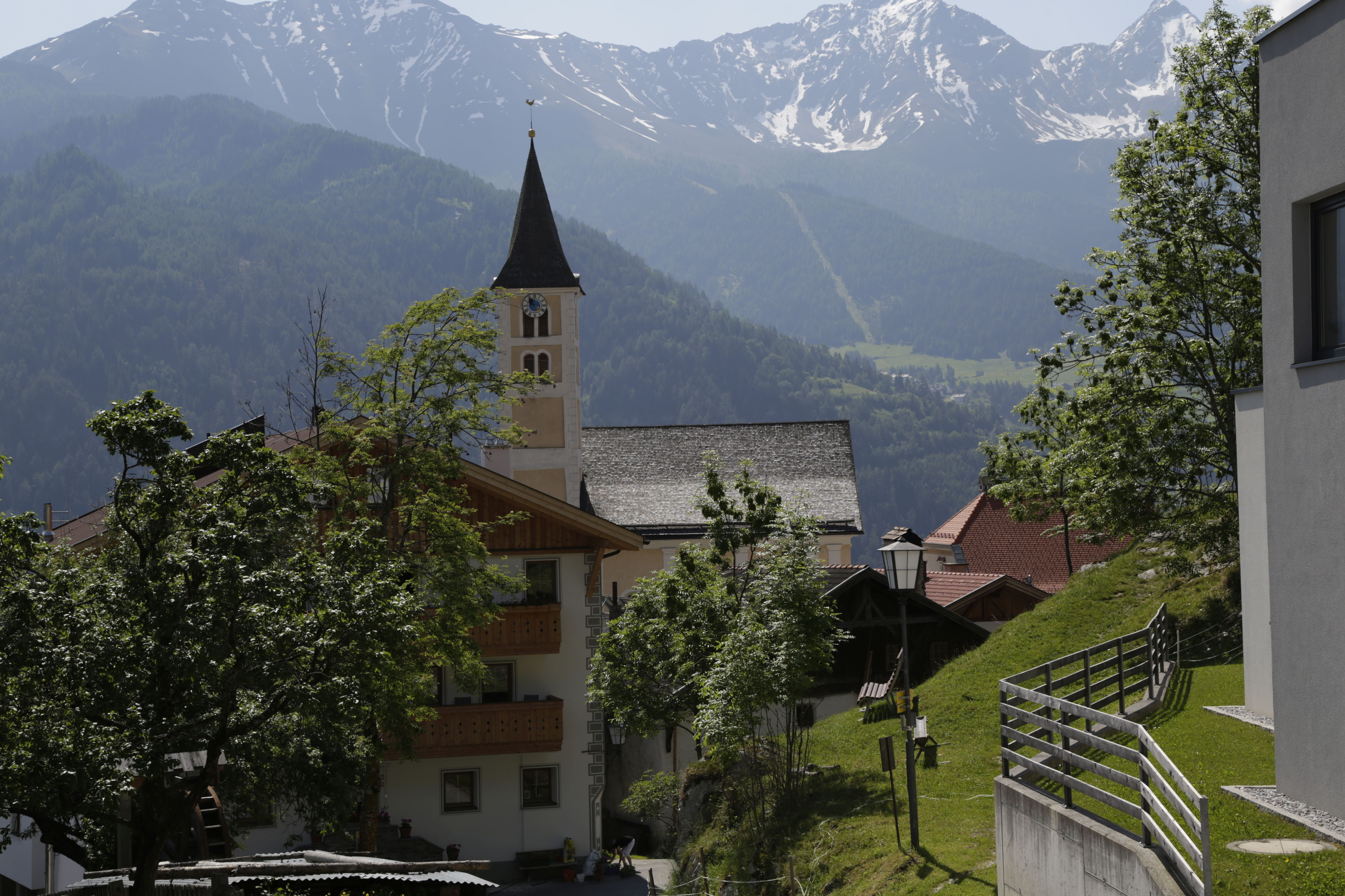 Blick auf die Pfarrkirche von Ladis